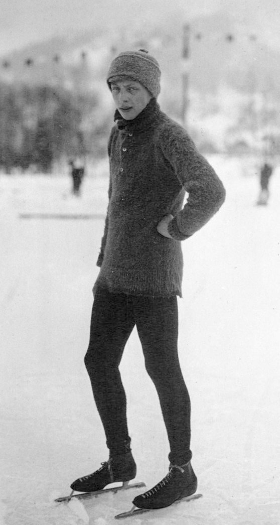 Chamonix, départ du championnat : Van Volxem ; [patinage sur glace] : [photographie de presse] / Agence Meurisse